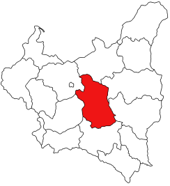 Autor: Topory Licencja: GNU FDL.